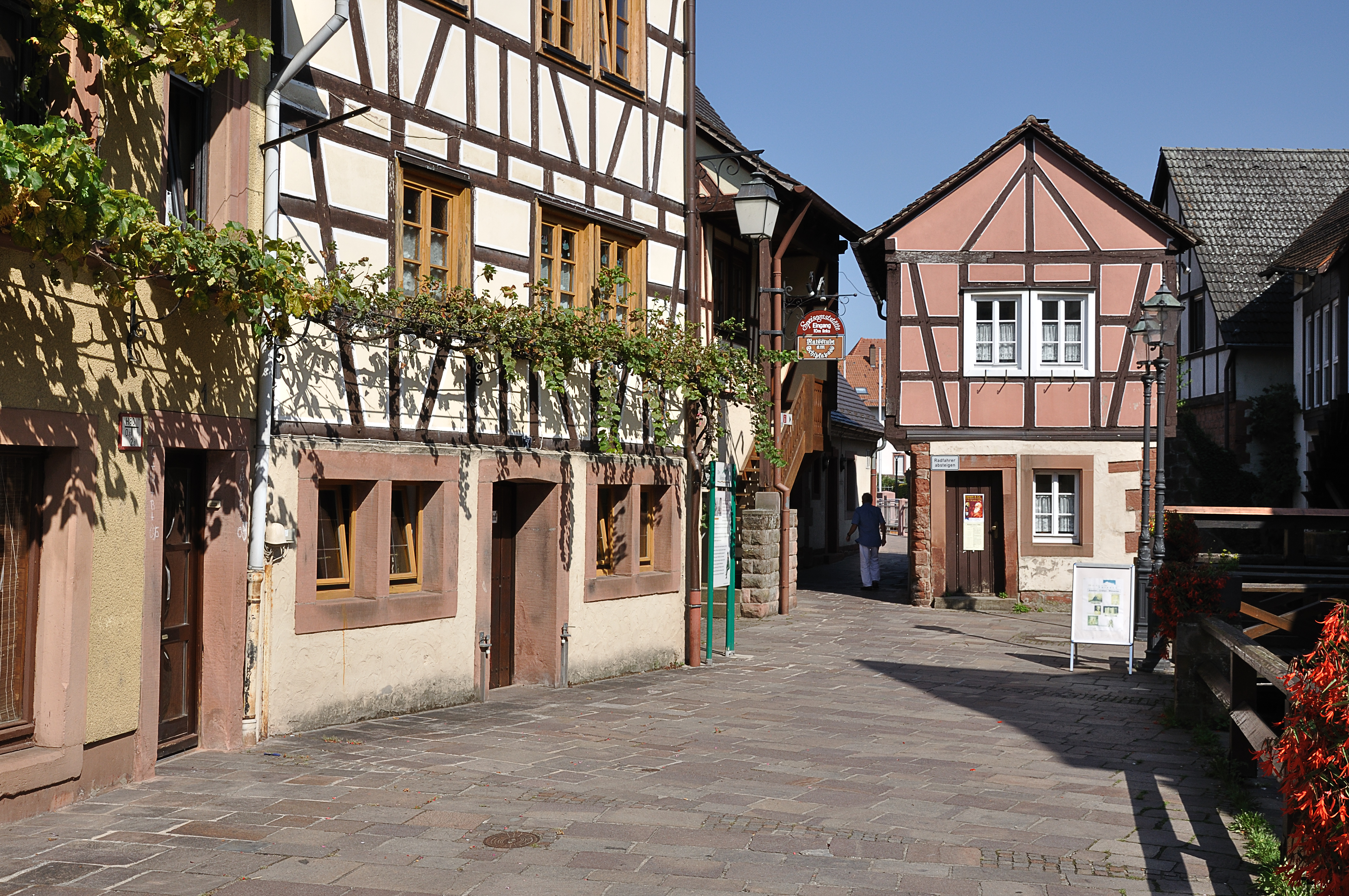 Der Durchlass Schipka-Pass in Annweiler